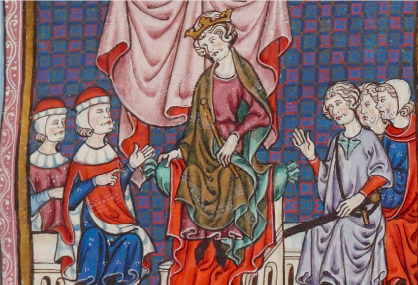 Conseil présidé par jacques II d'aragon